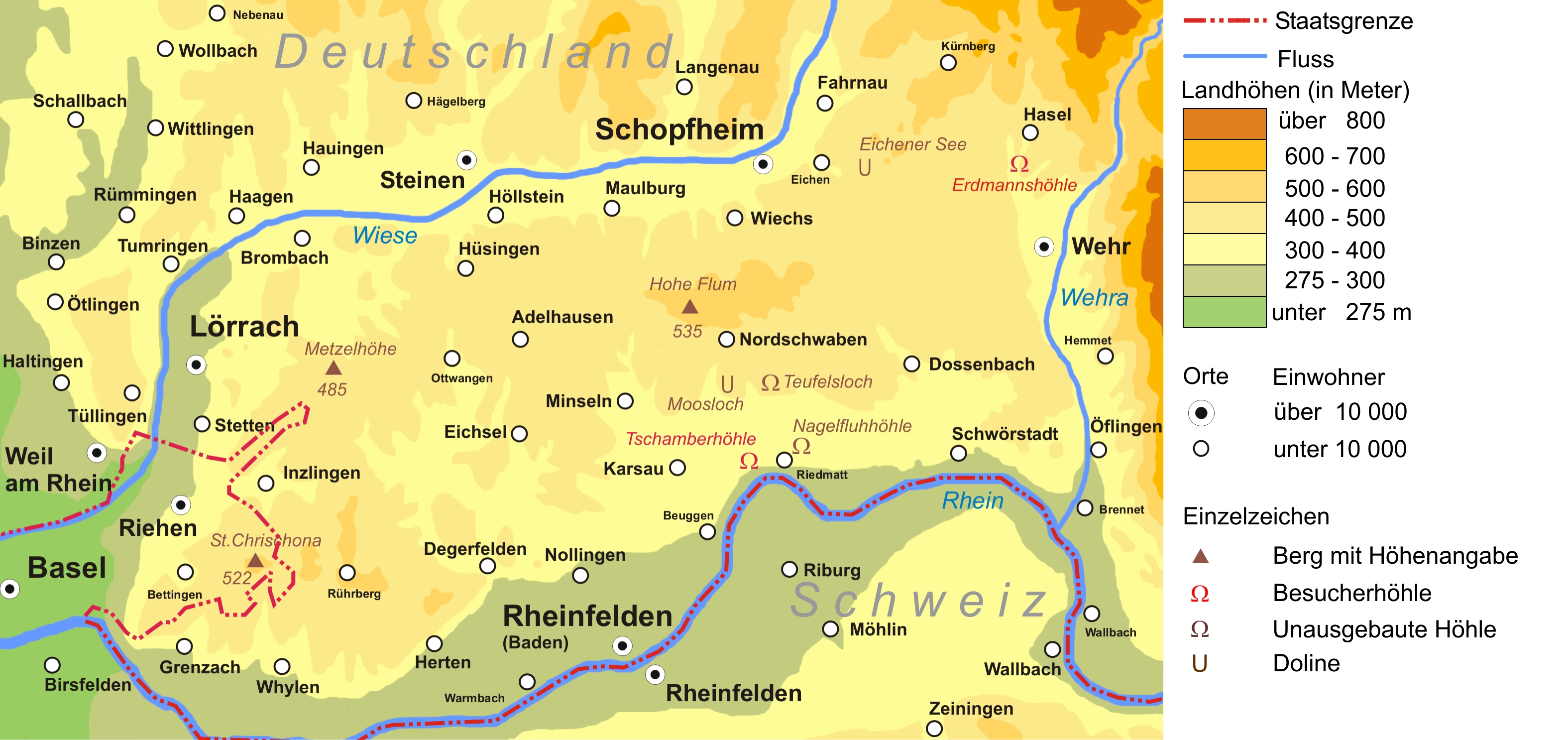 Topographische Karte Dinkelberg